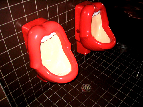 swallow.